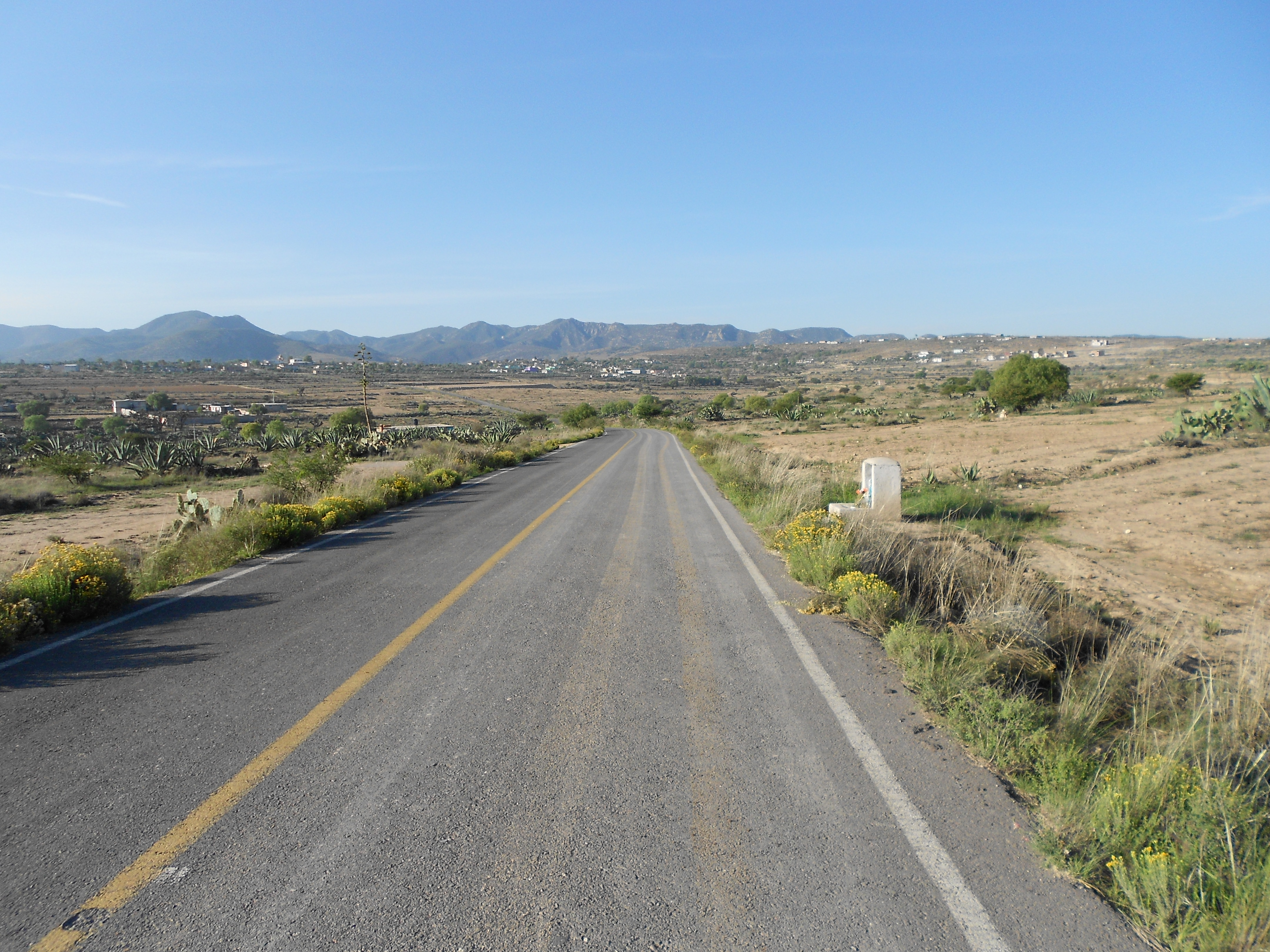 La cerretera principal que lleva al poblado de Agua Prieta